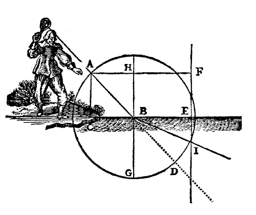 Zeichnung aus eines von Rene Descartes naturwissenschaftlichen Werken (17. Jahrhundert). Gezeigt wird der Vorgang der Lichtbrechung an einer Wasseroberfläche.